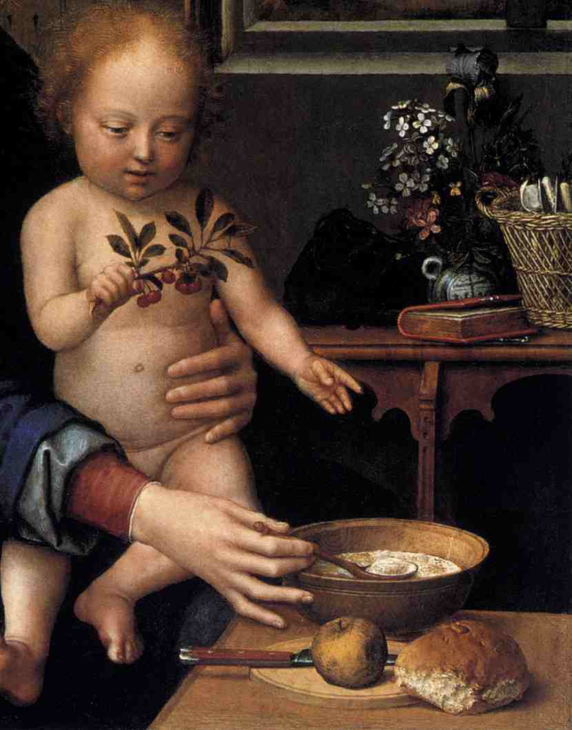 detail